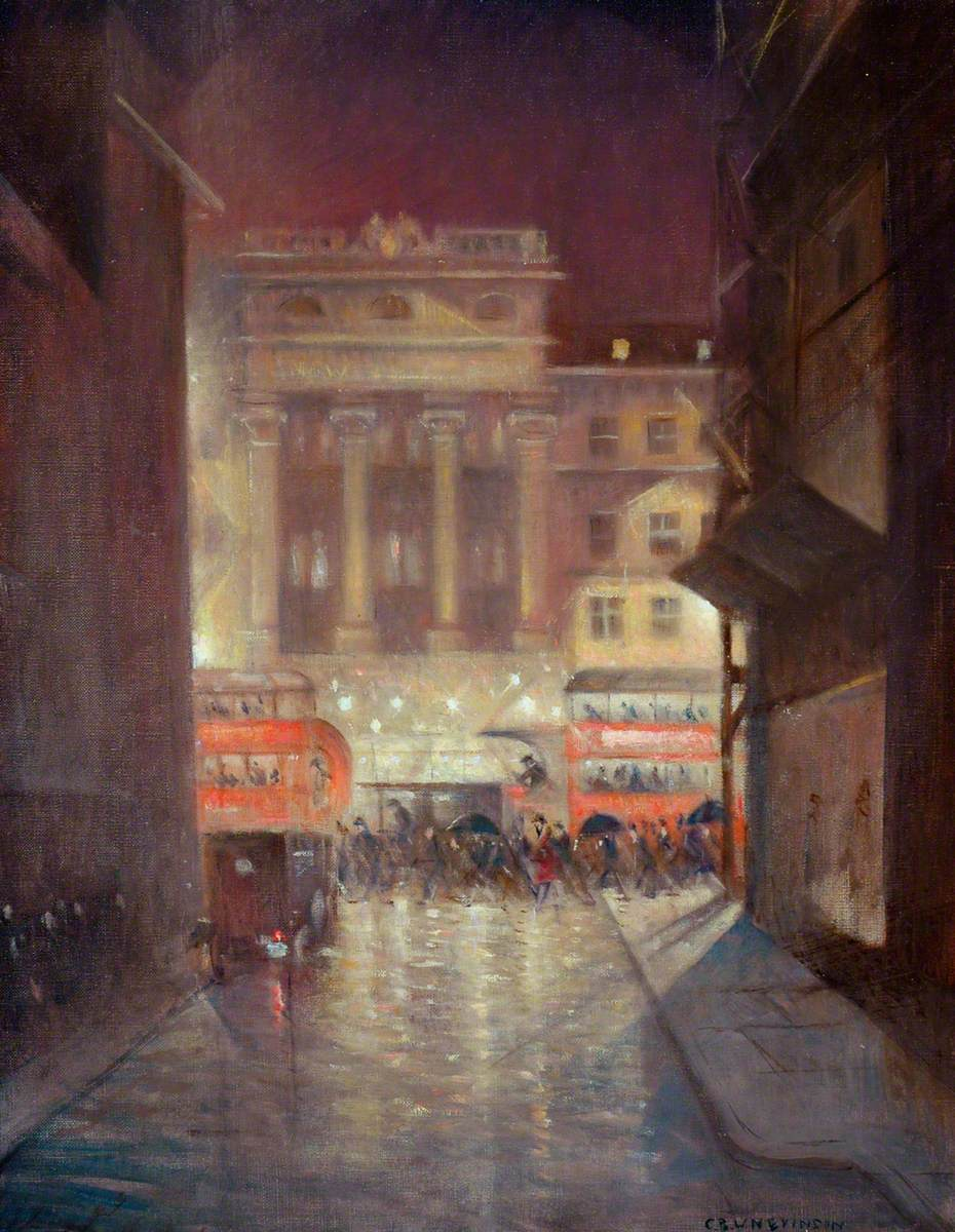 El Strand de noche (1937), de Christopher R. W. Nevinson, Art Galleries and Museums, Bradford.